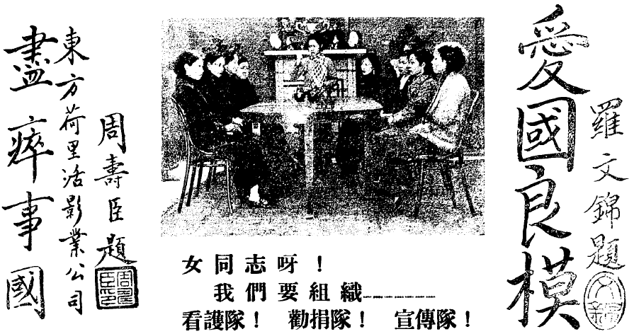 中文（香港）: 香港『東方荷里活影業公司』出品慷慨悲壯粵語歌唱戰爭片《生力軍》宣傳廣告，羅文錦題辭『愛國良模』；周壽臣題辭『盡瘁事國』。林妹妹飾演鄧玉珍：「女同志呀！我們要組織………看護隊、勸捐隊、宣傳隊。」